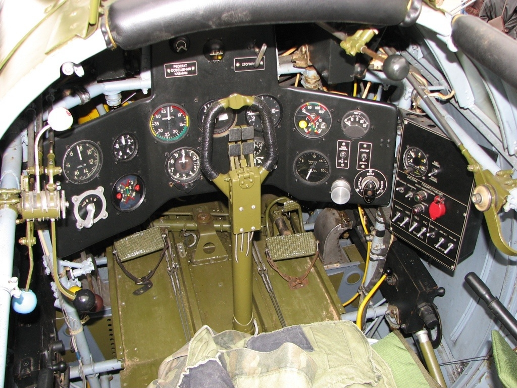 Federacia Aviarestauratorov Rossii